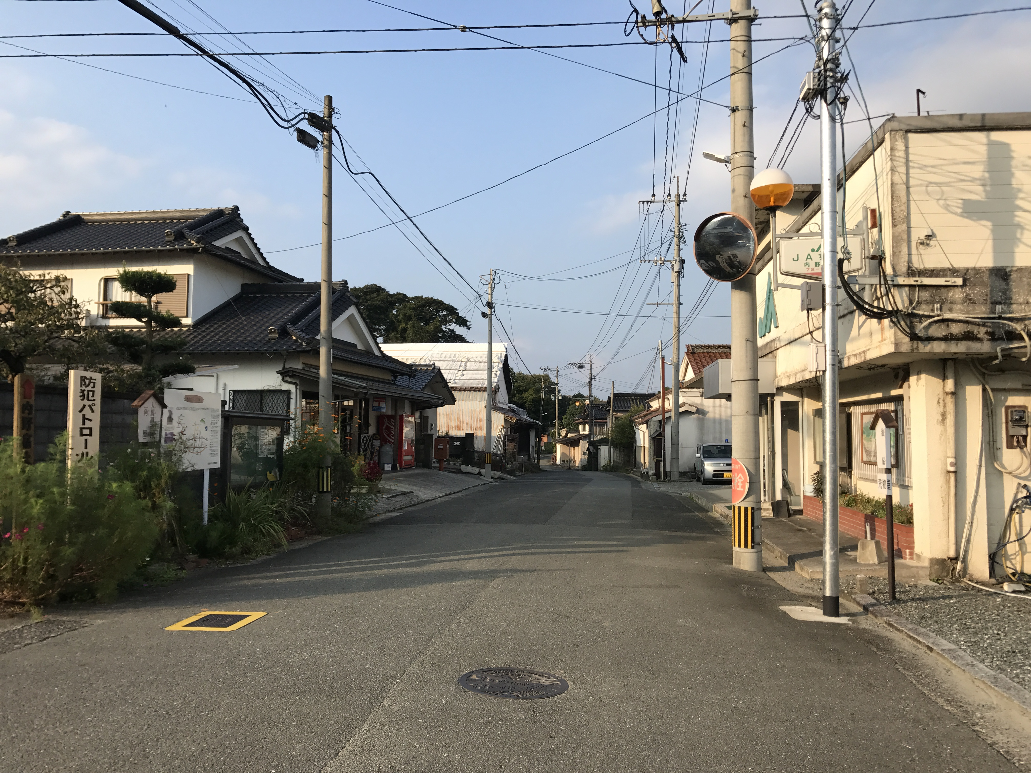 内野宿の町並み